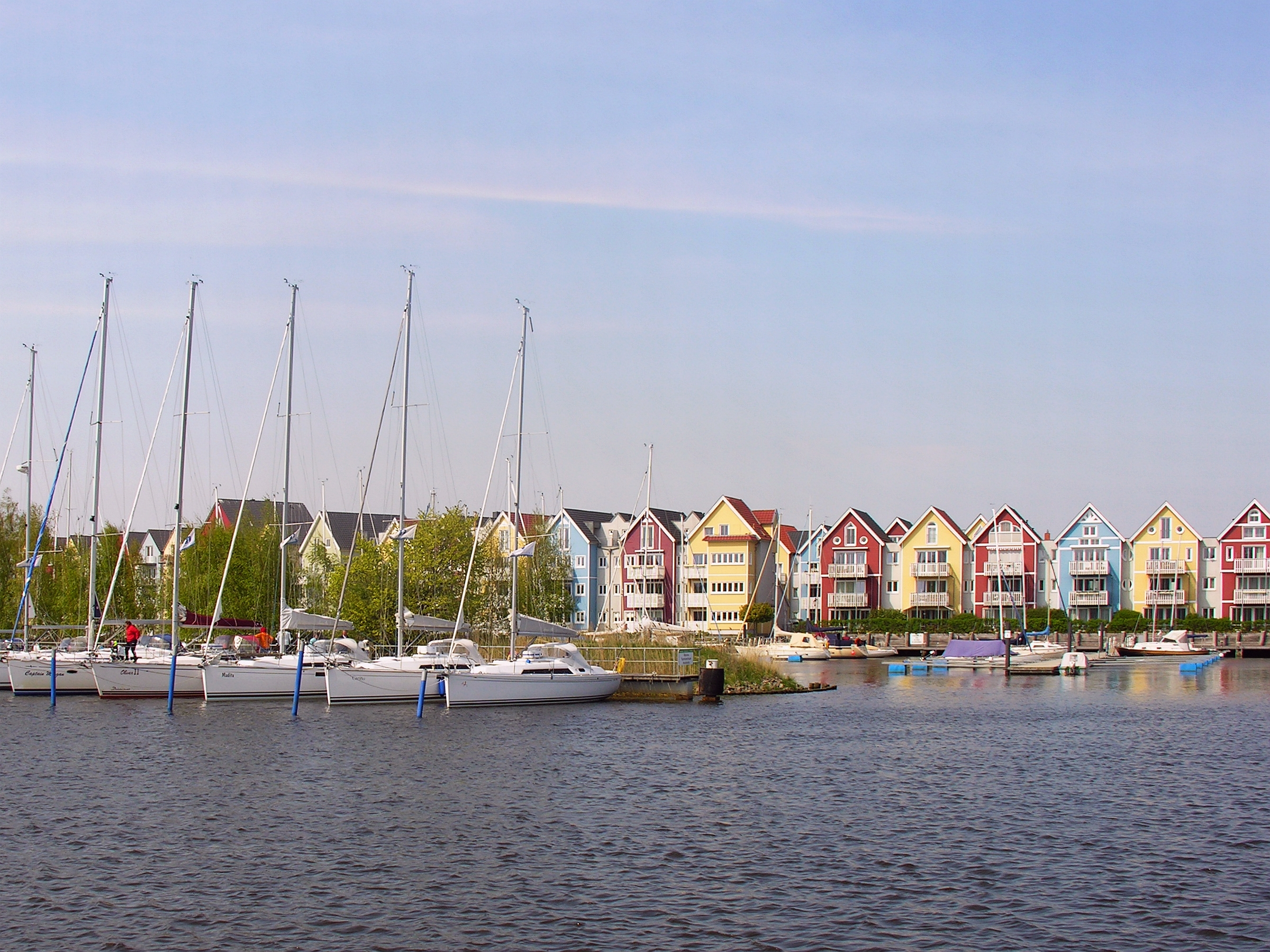 Yachtzentrum im neuen Hafen von Greifswald mit dem sogenannten Holzteichquartier, Mecklenburg-Vorpommern - Foto 2011 Wolfgang Pehlemann Steinberg/Ostsee DSCN8665